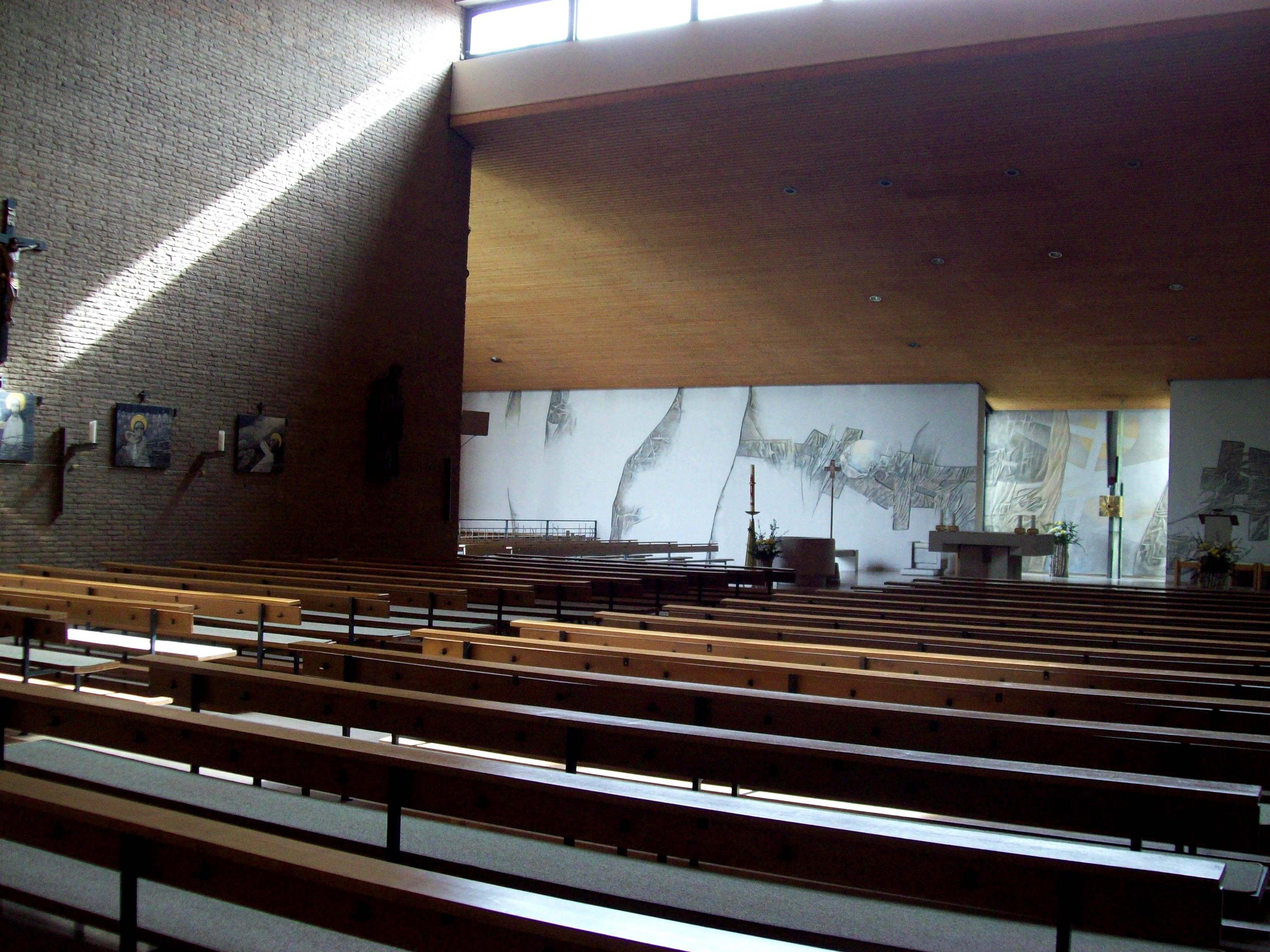 St. Pius Aschaffenburg Innenansicht Mittelschiff